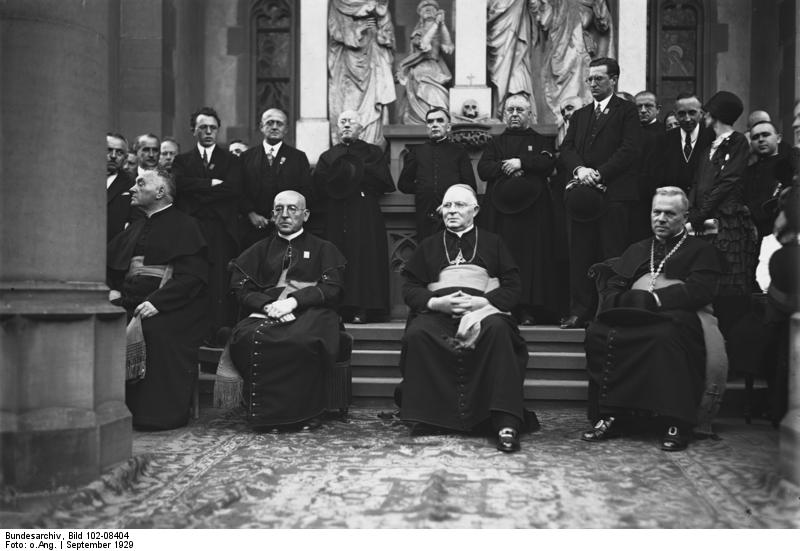 Hildegardesfest am Mittel-Rhein! Anlässlich des 750. Todestages der heiligen Hildegard von Bingen, fand unter Teilnahme von Prälat Dr. Seipel, Reichskanzler a.D. Dr. Wirth und anderen hohen kirchlichen Würdenträger eine feierliche Prozess ion in Bingen a/Rhein statt. Hohe kirchliche würdenträger während des Hildegardesfestes in Bingen am Mittelrhein, von links nach rechts: Prälat Dr. Seipel,/Bischoff Dr. Ludwig Hugo Maria von Mainz / und Bischoff Spoll von Rothenburg ob der Tauber/